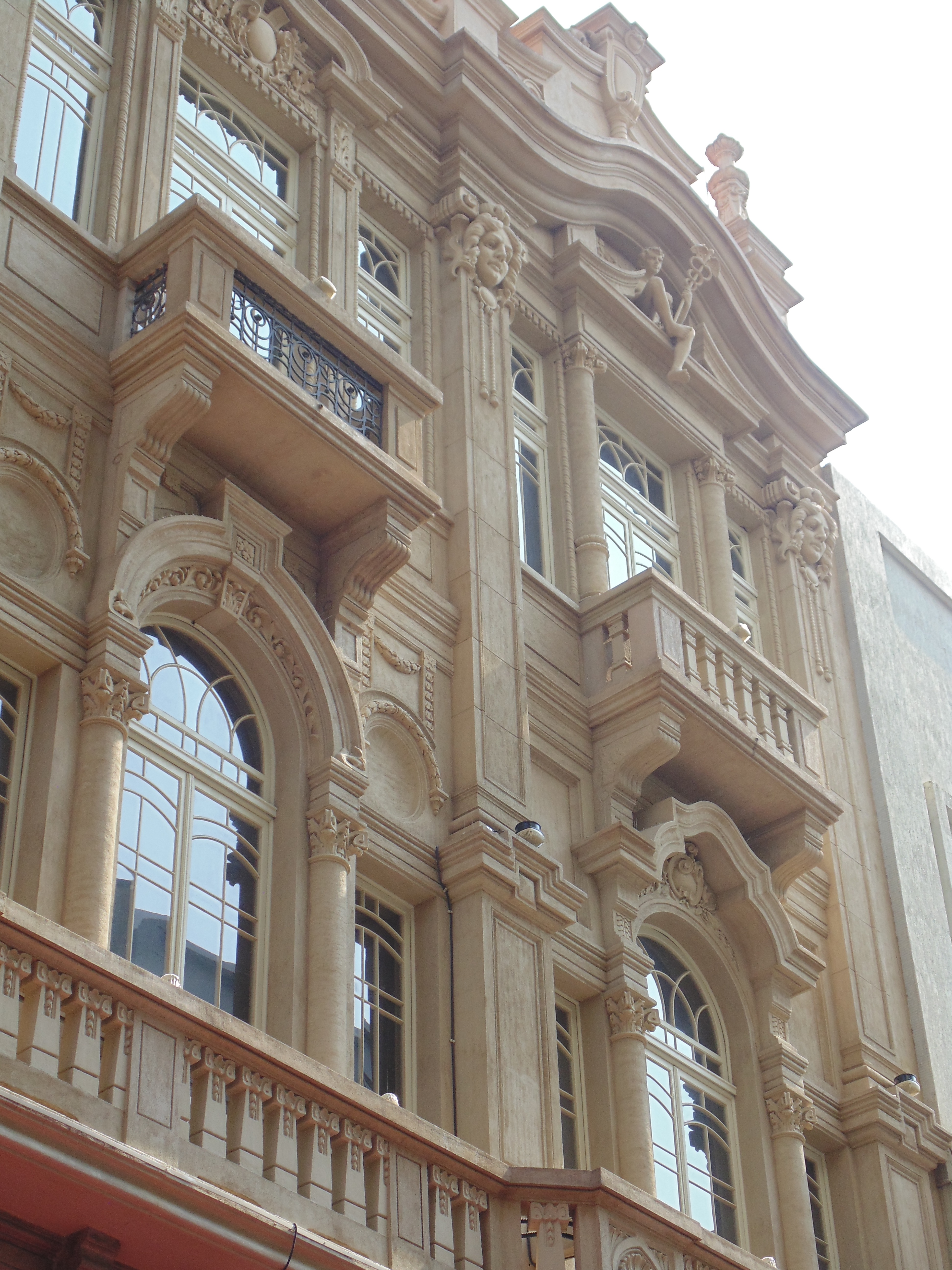 Janelas na vertical do Palacete Tereza Toledo Lara, em São Paulo (SP), Brasil